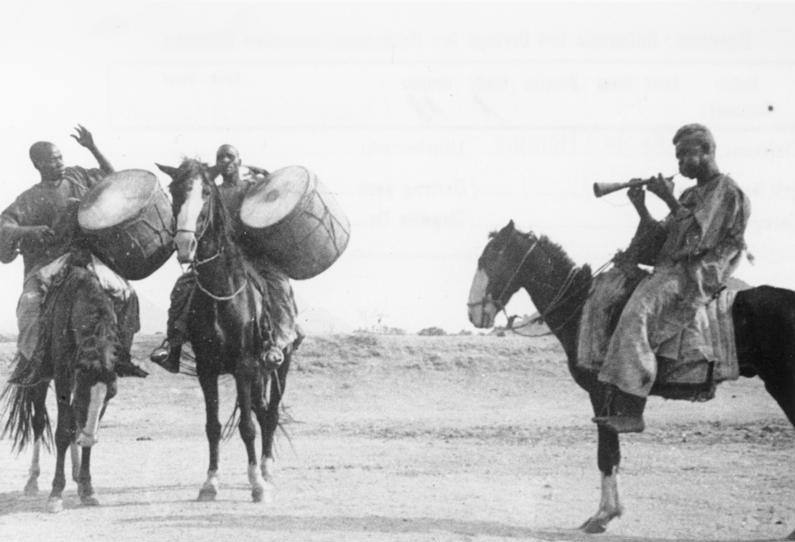 Kamerun. Mora. Orchester Mandara.